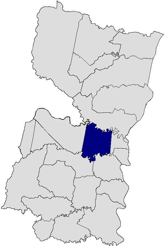 Minga Guazú